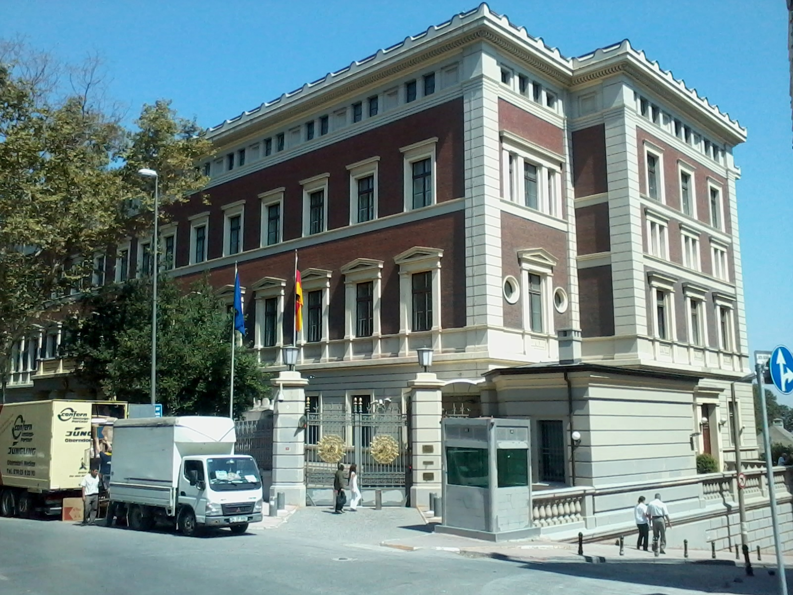 İstnbul'daki Almanya Başkonsolosluğu.